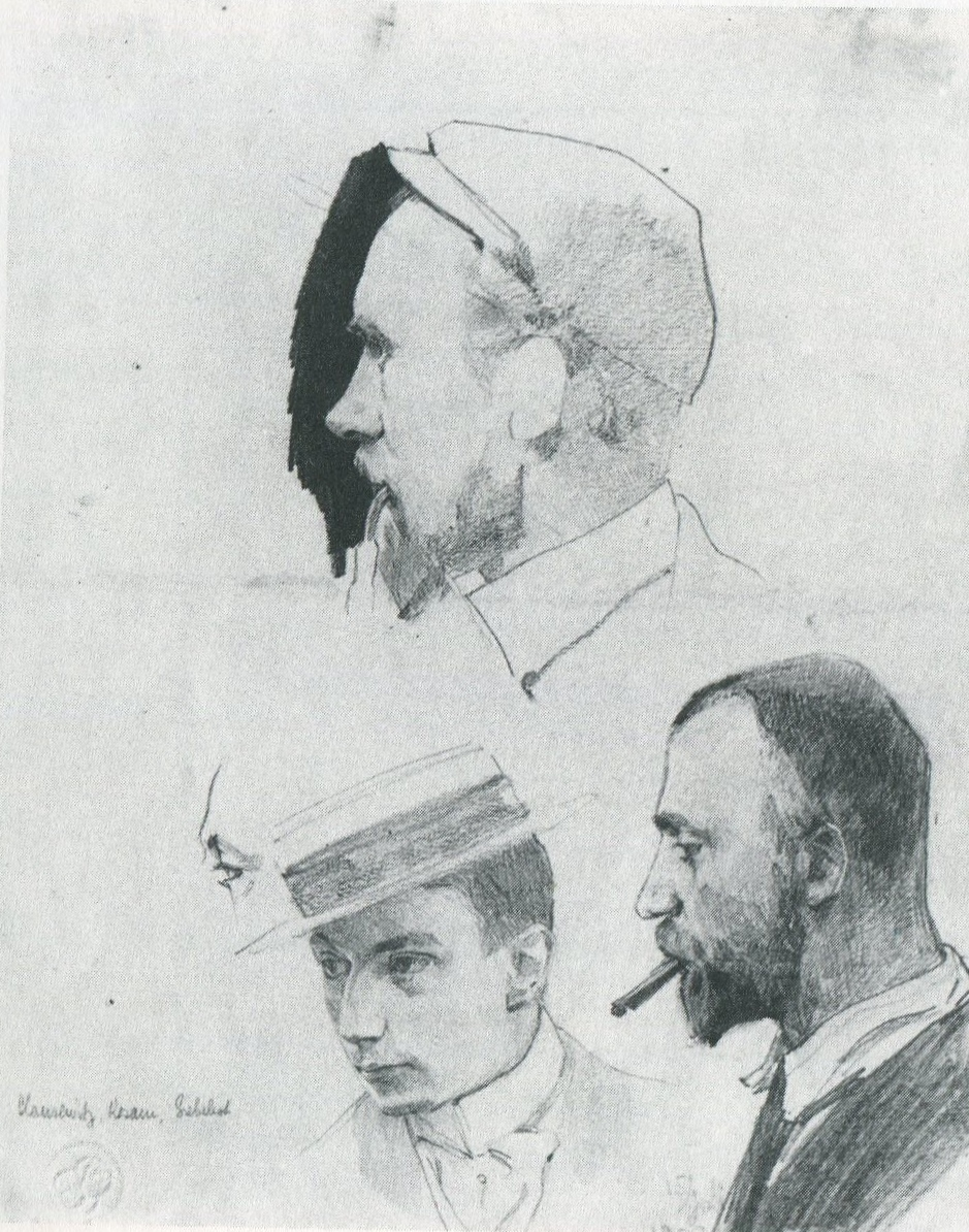 Porträt der Maler Clausewitz, Rosam und Siebelist